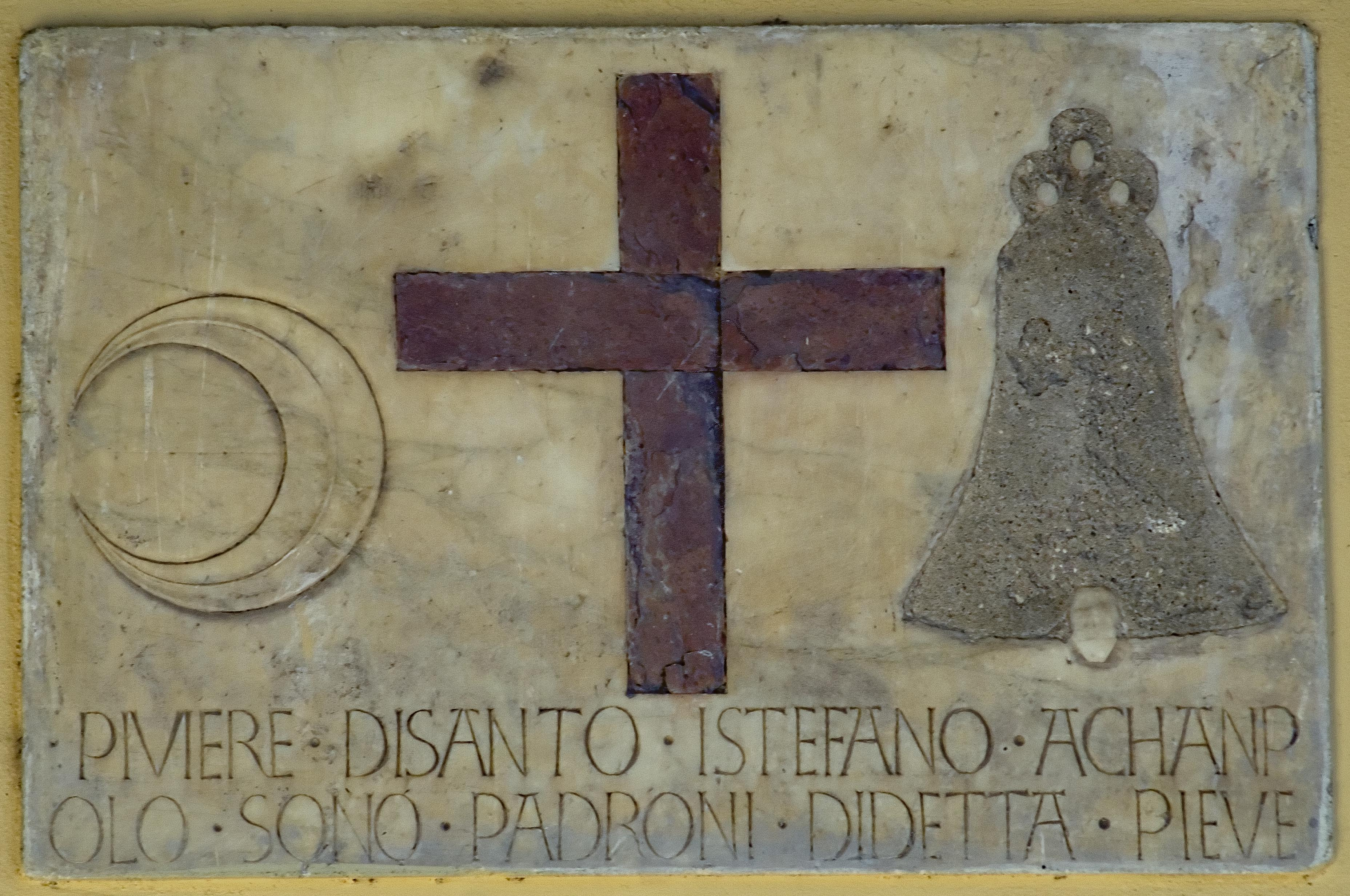 Particolare del portico di S.Stefano a Cmpoli